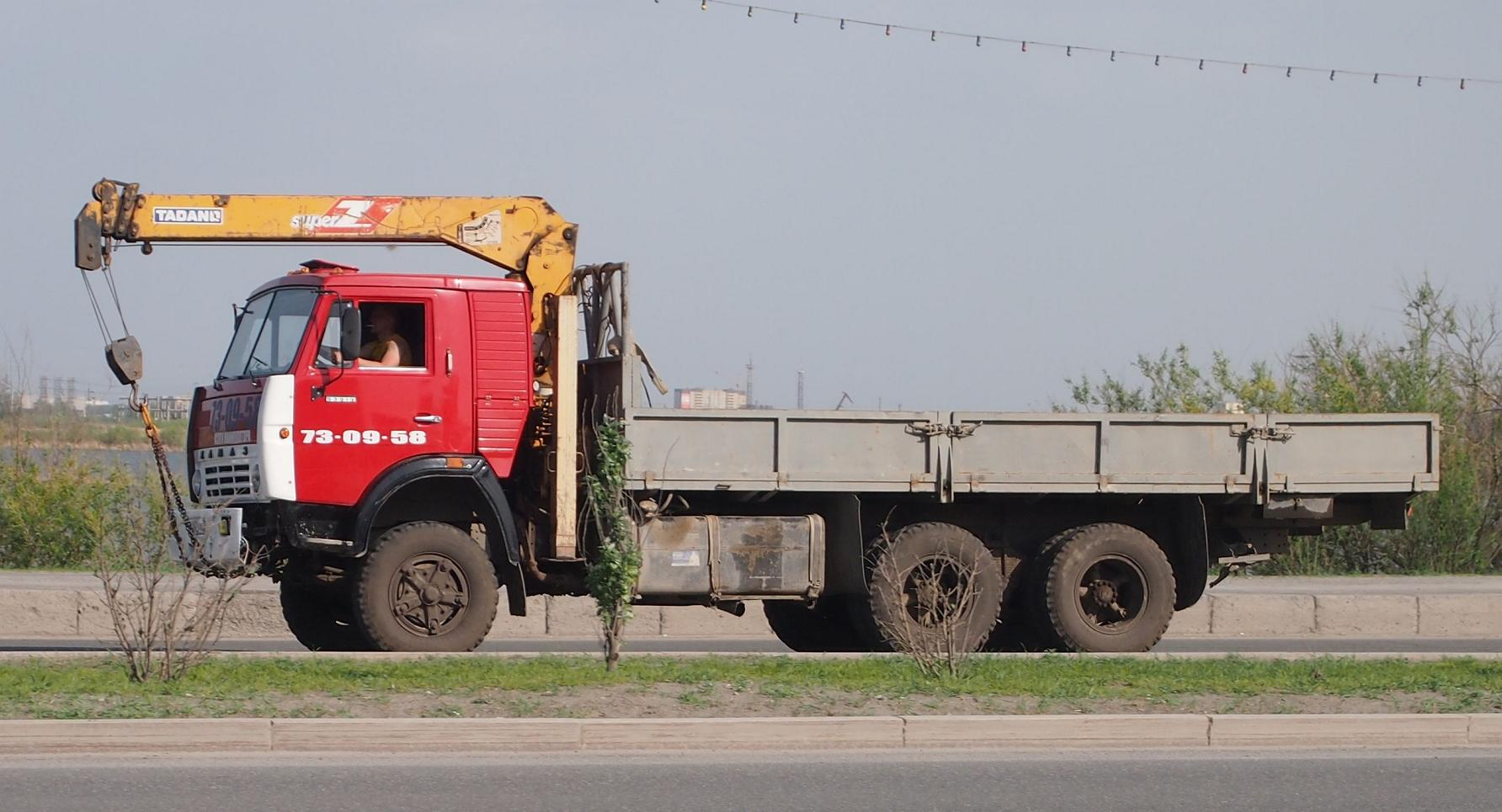 КамАЗ-53212 в Тюмени